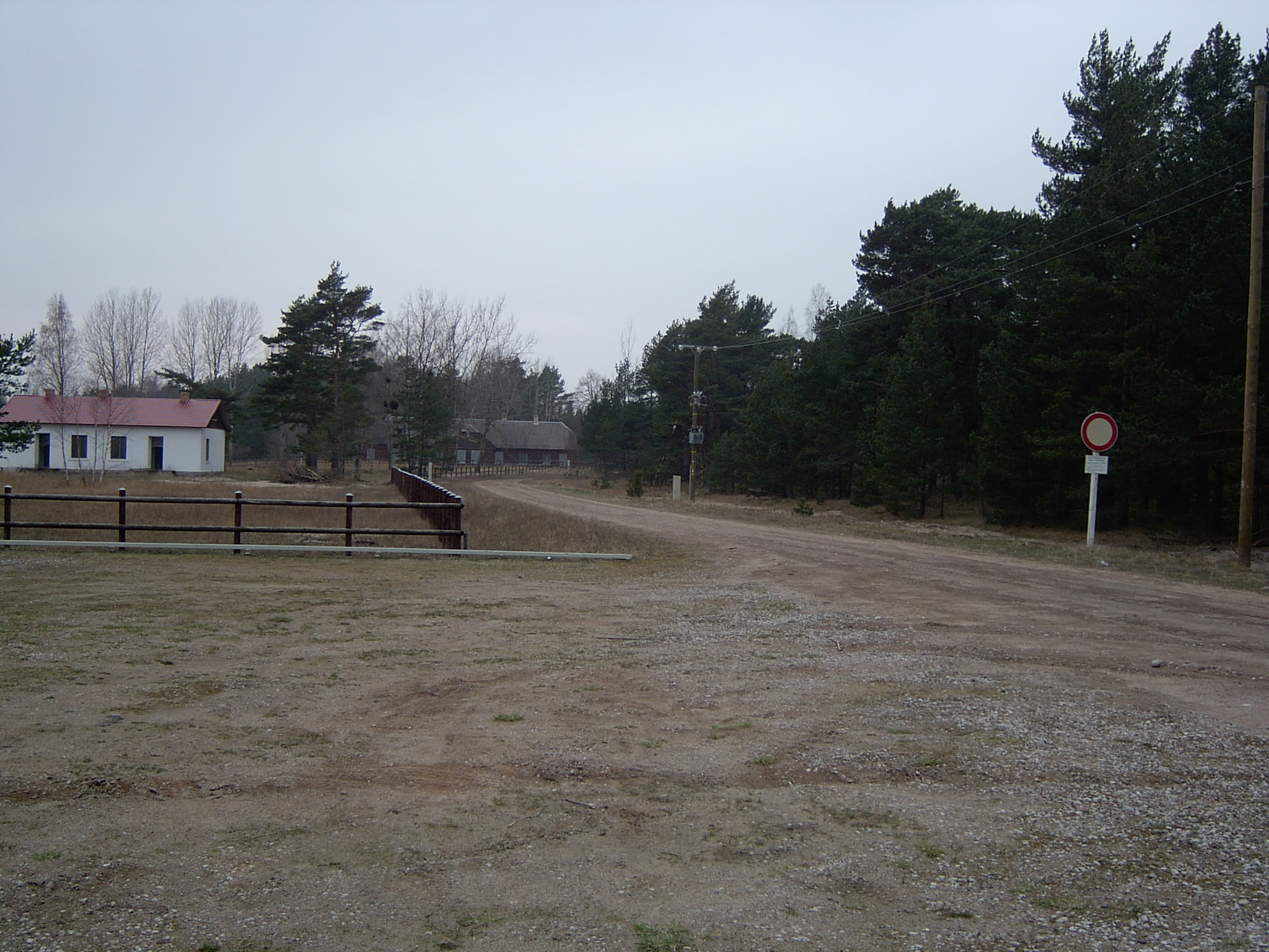 Tārgale parish, Latvia